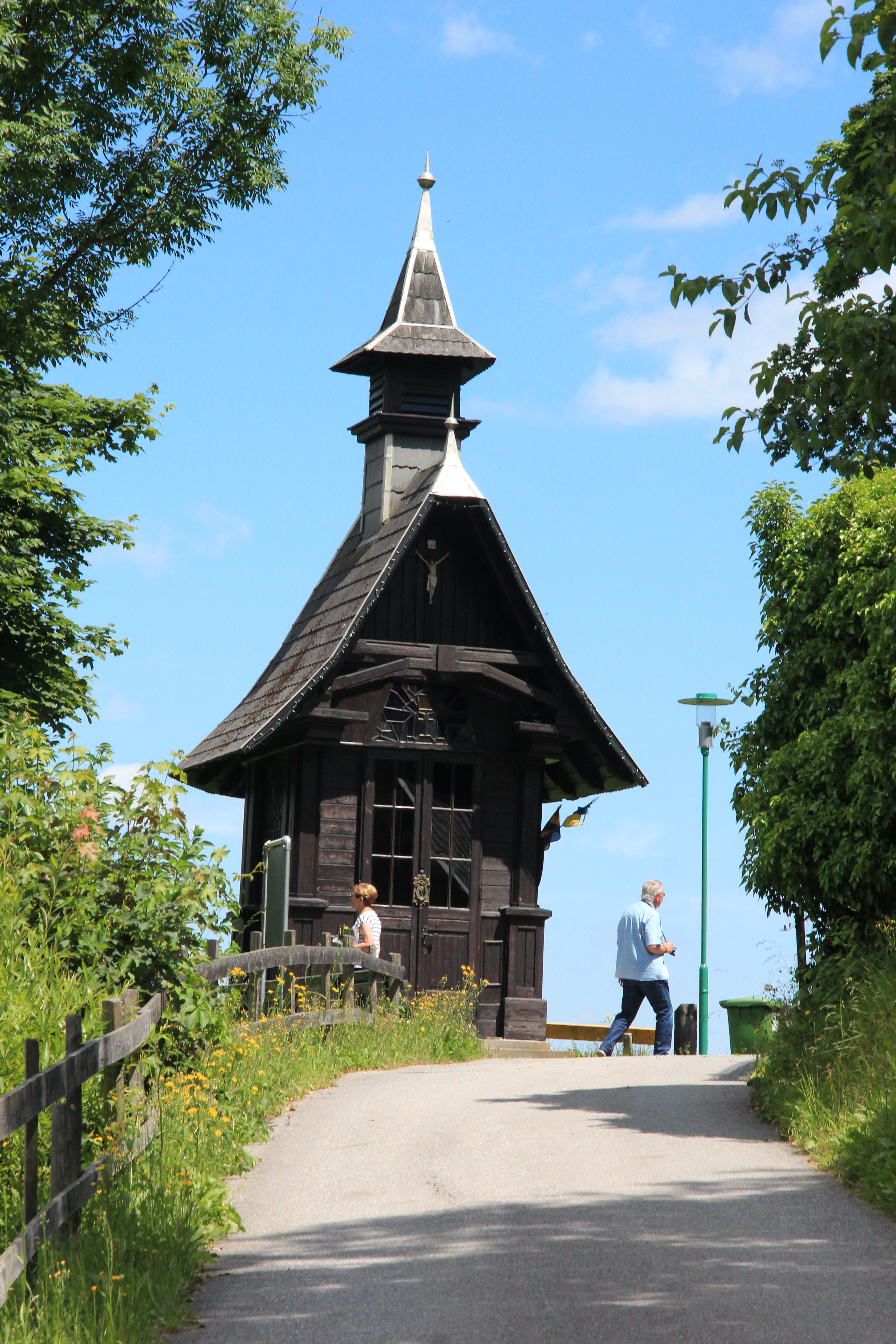 Barbarakepelle in Küb, Payerbach